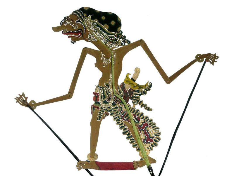 Schaduwfiguur. Wajangpop voorstellende Patih Sengkuni Unknown language: Wayang purwa